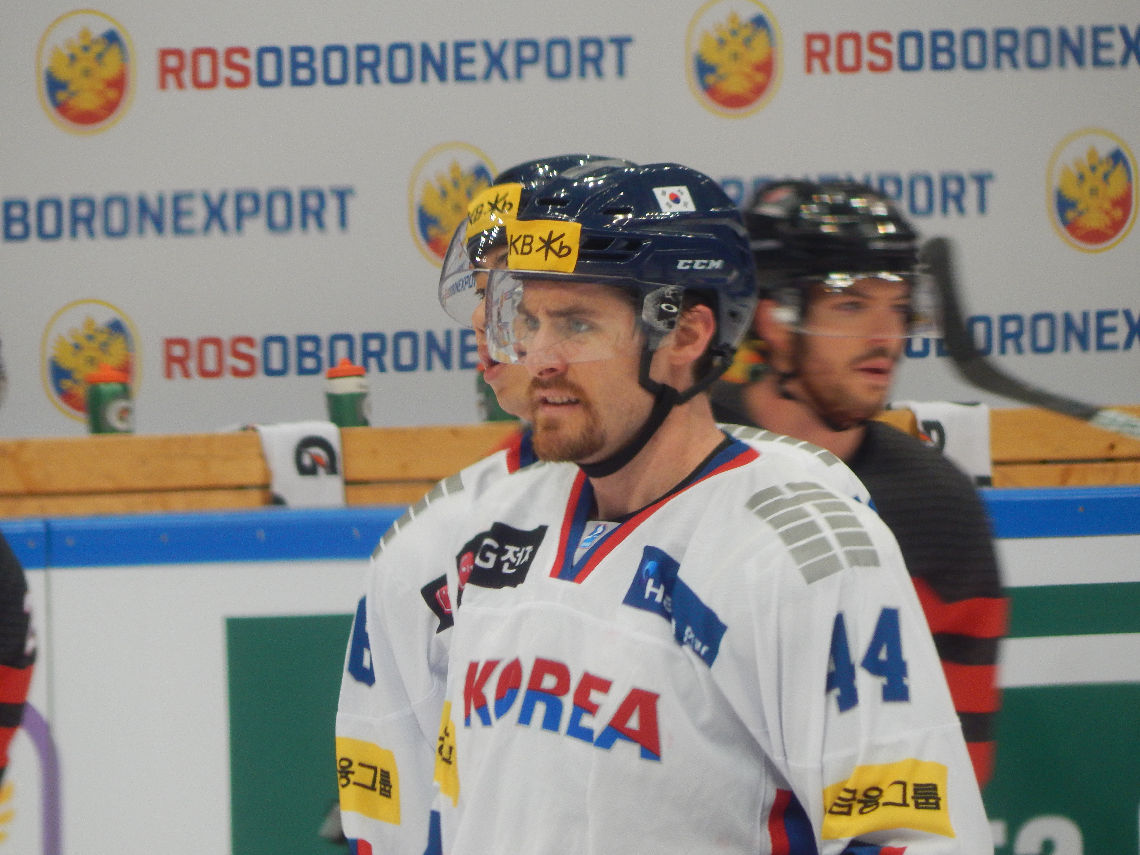 Кубок Первого Канала 2017, матч Канада - Южная Корея (13 декабря 2017) 44 PLANTE,Matthew Alexander (KOR)